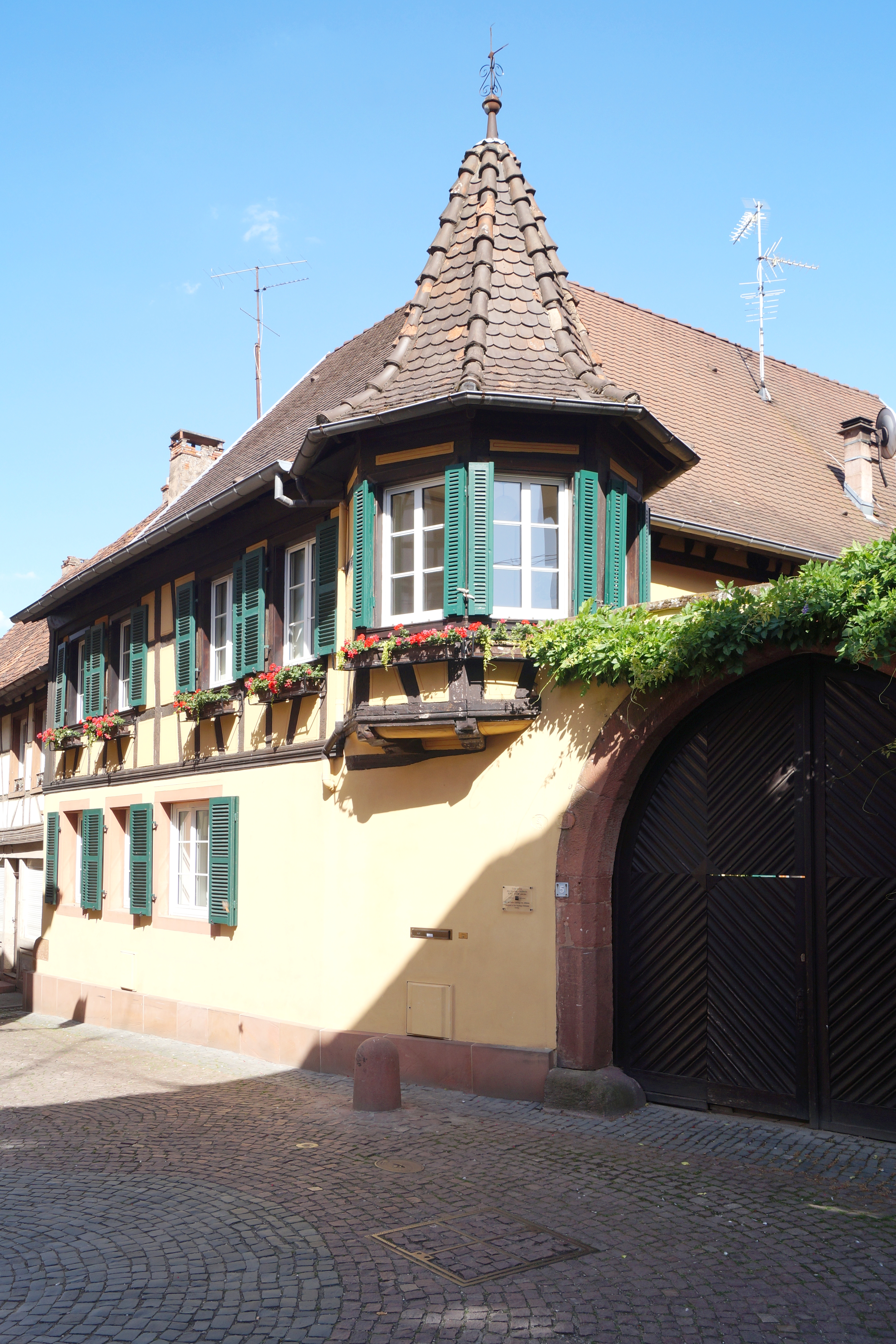 Adelshof der Familie Gayling von Altheim in Bouxwiller/Buchsweiler (Bas-Rhin), rue des Seigneurs 5.